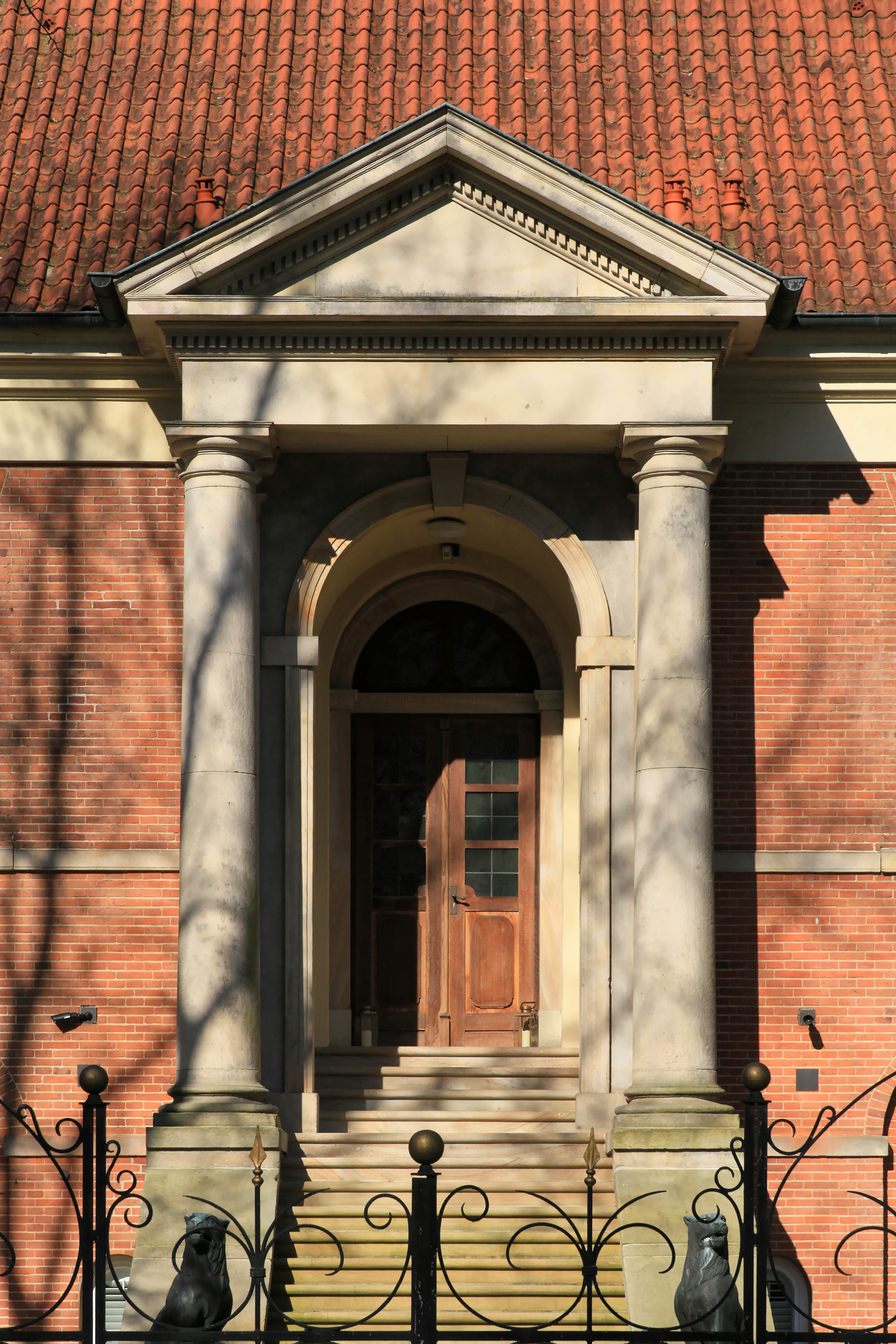 Amtshaus Nienhaus, Meppener Straße (B70) in Aschendorf, Papenburg